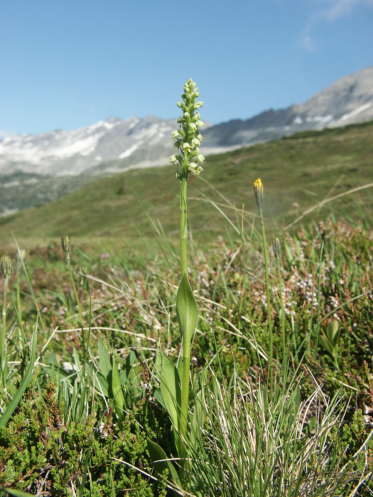 Pseudorchis albida, Zillertaler Alpen, Italy